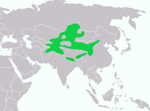 мапа поширення Prunella fulvescens